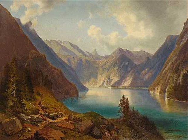 Ein Ölgemälde von Max Wolfinger